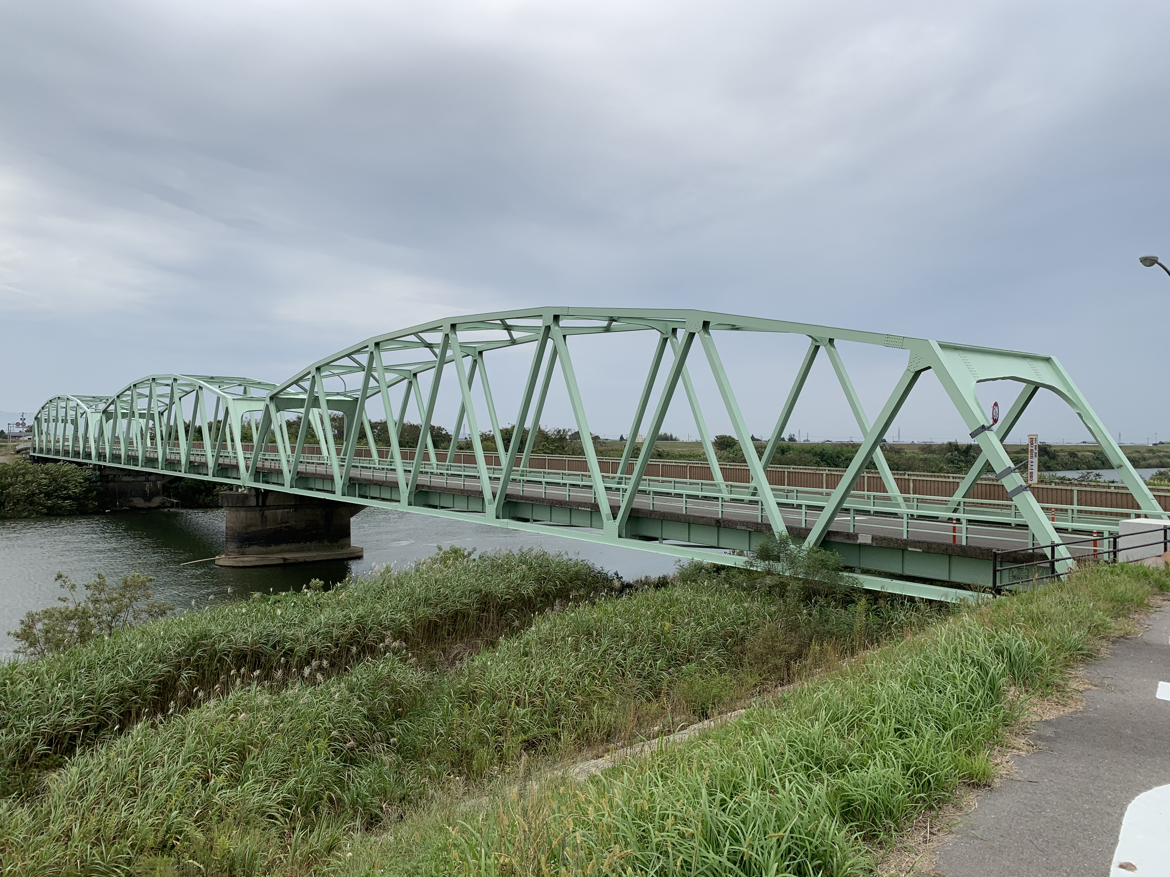 信濃川にかかる小須戸橋